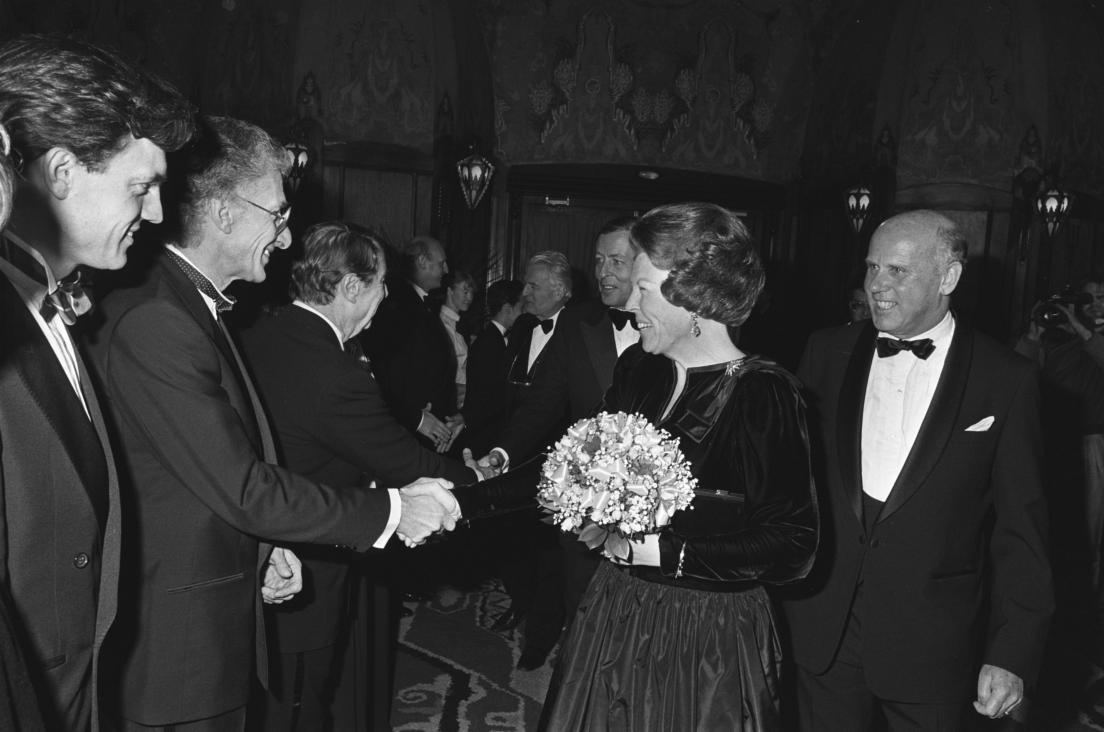 Collectie / Archief : Fotocollectie Anefo Reportage / Serie : Koningin Beatrix bezoekt de première van de film "De Aanslag" Beschrijving : Na de première van de film "De Aanslag" ; schrijver Harry Mulisch schudt hand van koningin Beatrix Datum : 5 februari 1986 Locatie : Amsterdam, Noord-Holland Trefwoorden : film, koninginnen, premières, schrijvers Persoonsnaam : Beatrix (koningin Nederland), Mulisch, Harry Fotograaf : Fotograaf Onbekend / Anefo, [onbekend] Auteursrechthebbende : Nationaal Archief Materiaalsoort : Negatief (zwart/wit) Nummer archiefinventaris : bekijk toegang 2.24.01.05 Bestanddeelnummer : 933-5596